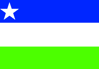 Esta é a bandeira do município de Viana.